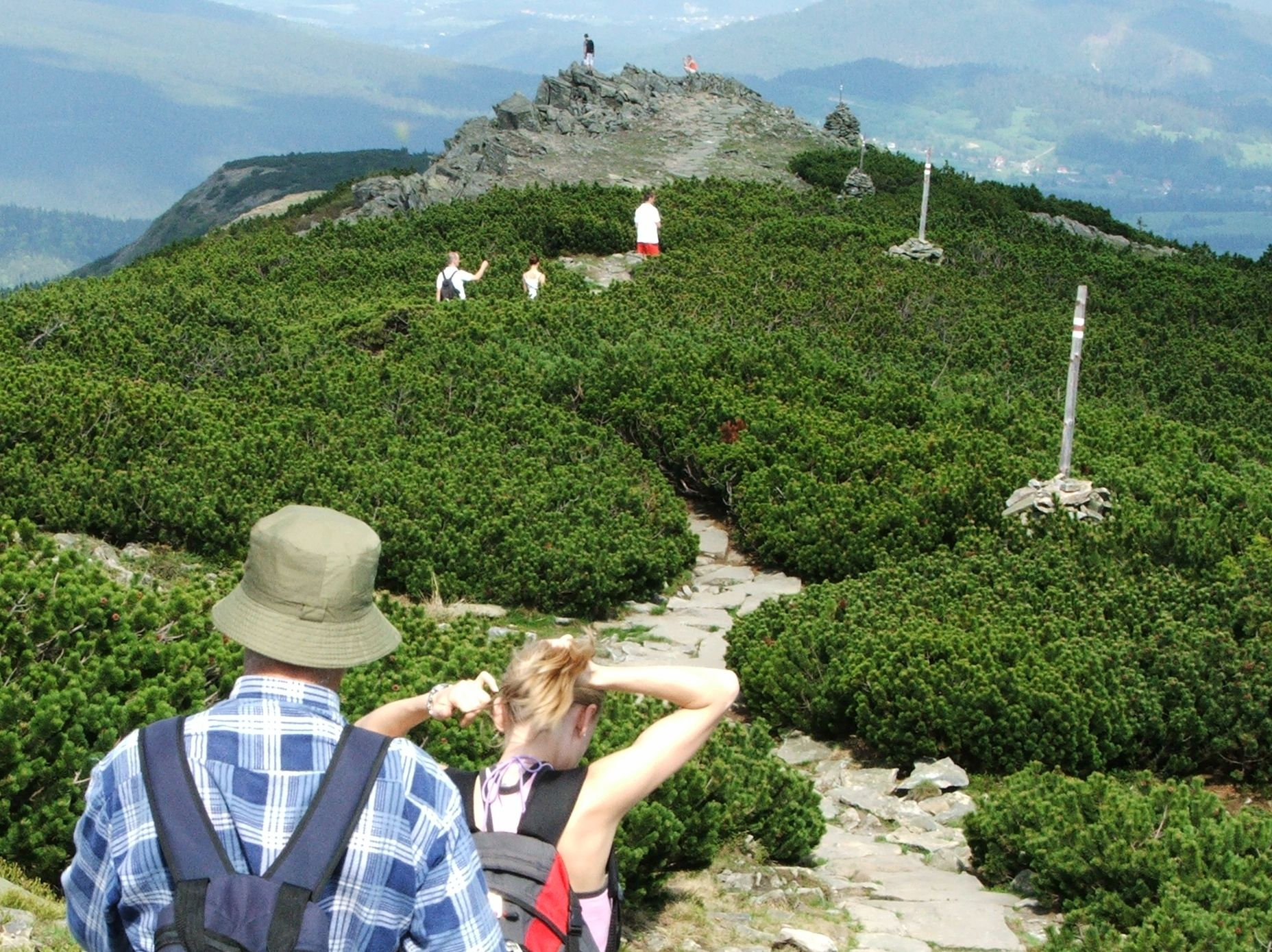 Data: 2006-05-09 Autor:Jerzy Opioła